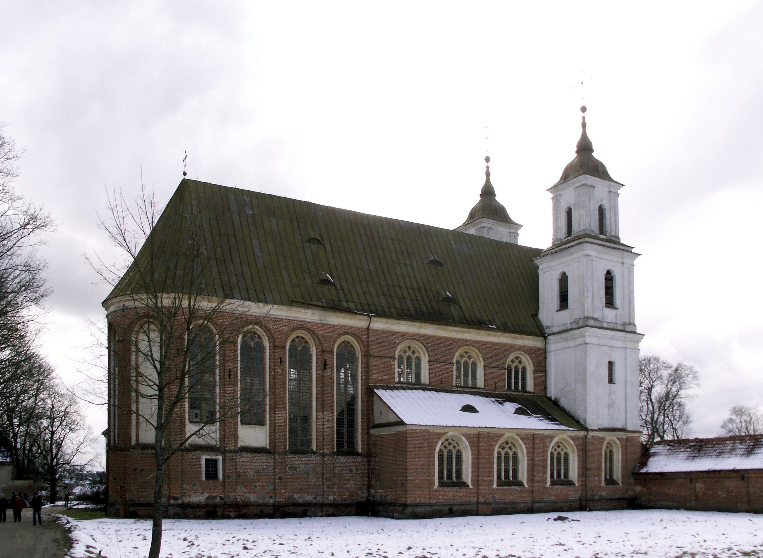 Tytuvėnų bažnyčia.